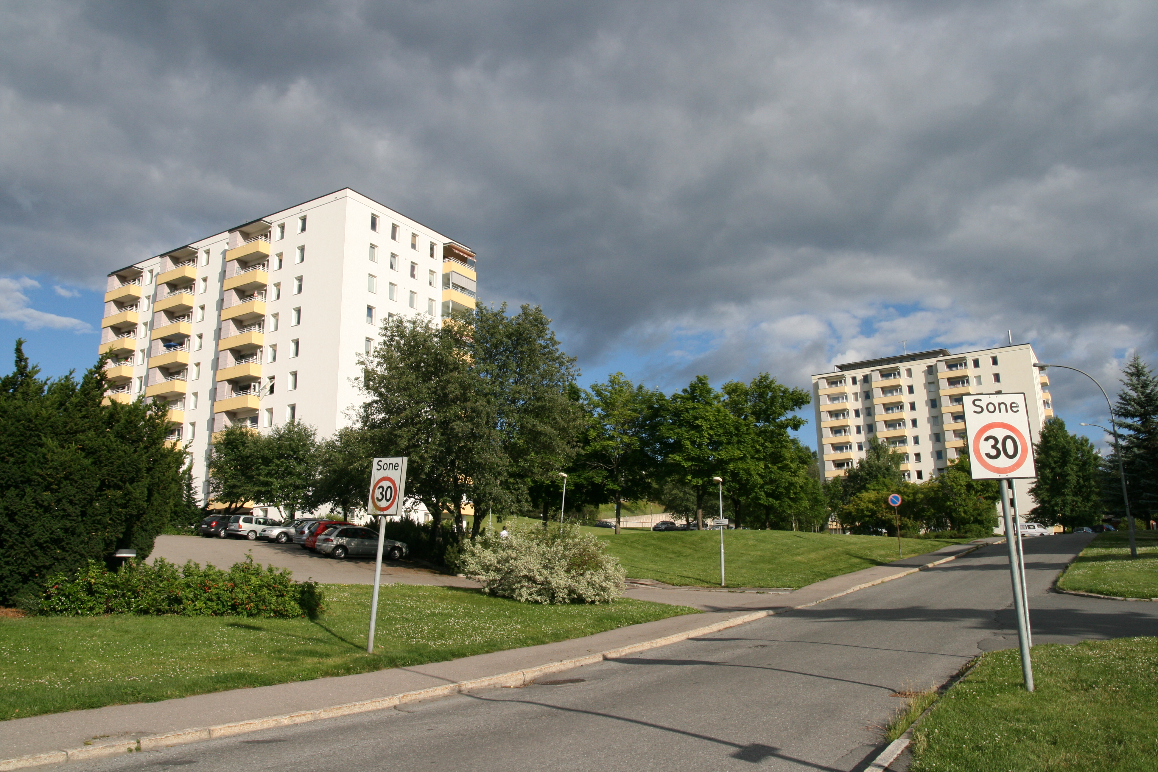 Veien Grønlibakken. De to boligblokkene har adresse Haakon Tveters vei 13 og 15. Skøyenåsen i Oslo